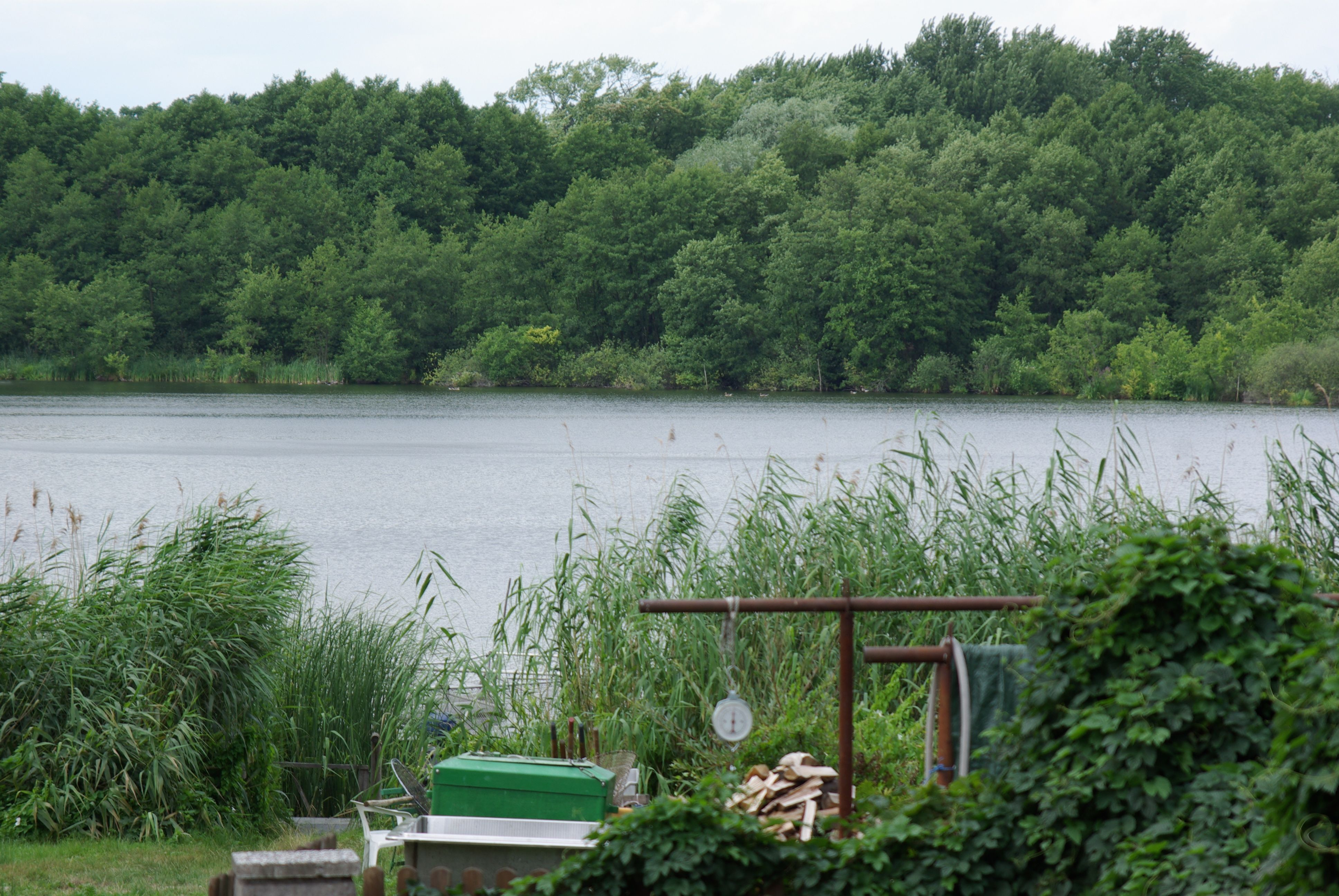 Steinhöfel, Ortsteil Heinersdorf, Landkreis Oder-Spree, Brandenburg, Deutschland, der gleichnamige See im Ortsteil Heinersdorf.